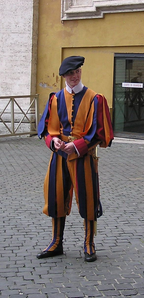 Guardia Svizzera Pontificia